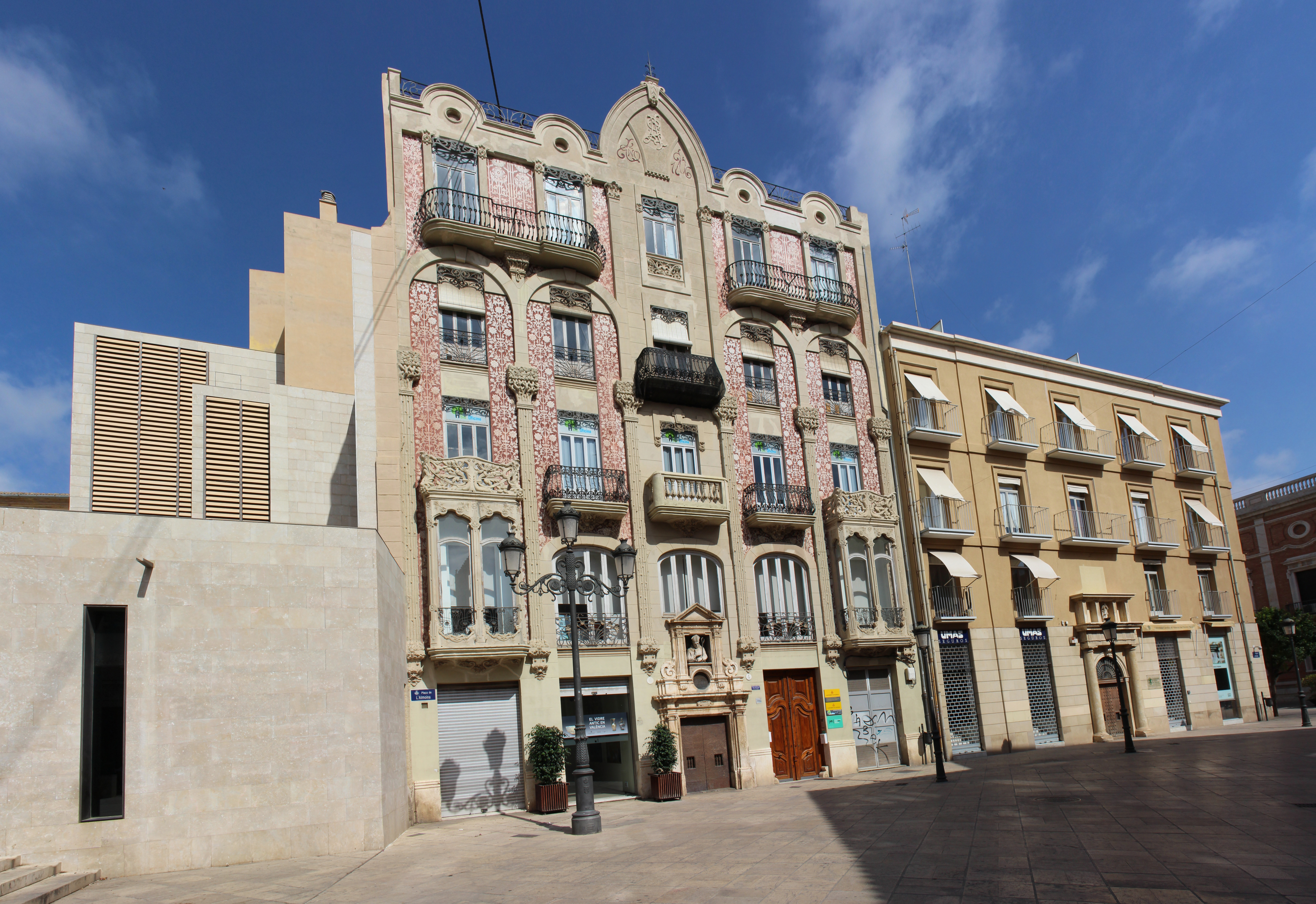 Casa Sancho o del Punt de Gantxo de Manuel Peris Ferrando en la plaza de la Almoina, 4, 1906